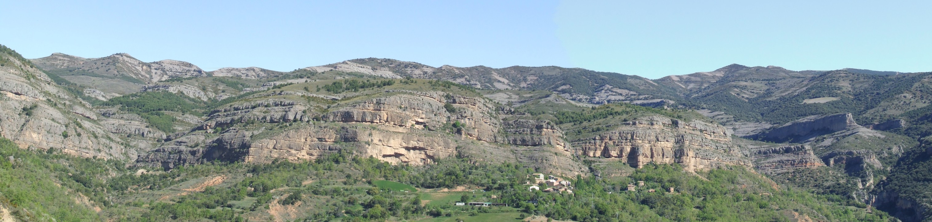 Vista panoràmica del poble de Gurp (Gurp de la Conca, Tremp, Pallars Jussà)